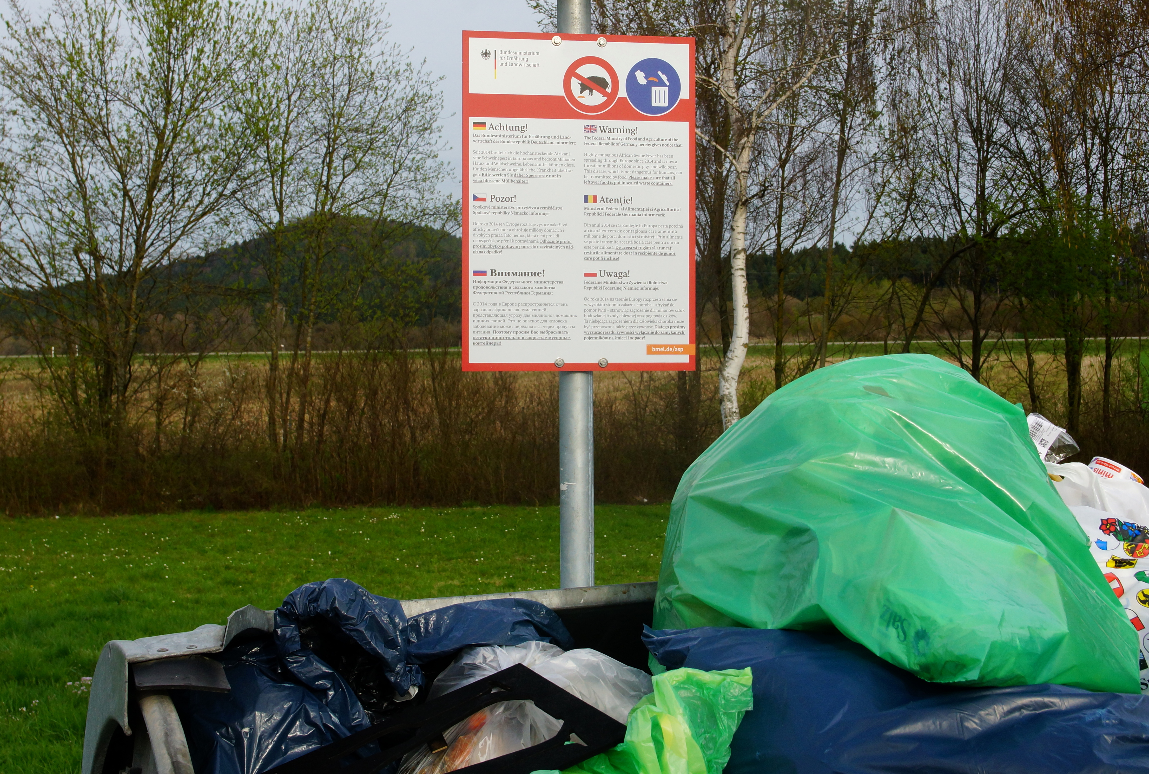 Warnschild an einem Autobahnparkplatz in Baden-Würtemberg zur Vermeidung eines Ausbruchs der afrikanischen Schweinepest keine Essensreste in unverschlossene Mülleimer zu werfen